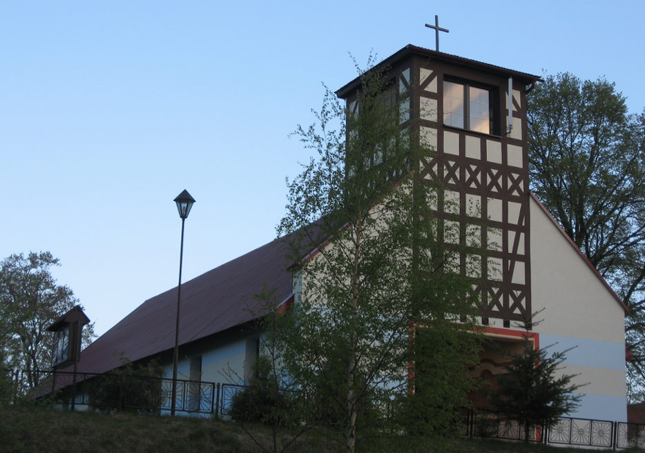 Nawcz - rzymskokatolicki kościół-Pomnik filialny pw. bł.ks.bpa Michała Kozala, bł.ks.Stefana Frelichowskiego, bł.ks.abpa.Antoniego Nowowiejskiego oraz bł.107 Męczenników z okresu II Wojny Światowej, 1994